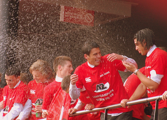 Huldiging van AZ als landskampioen van het seizoen 2008-2009, met rechts Graziano Pellè.